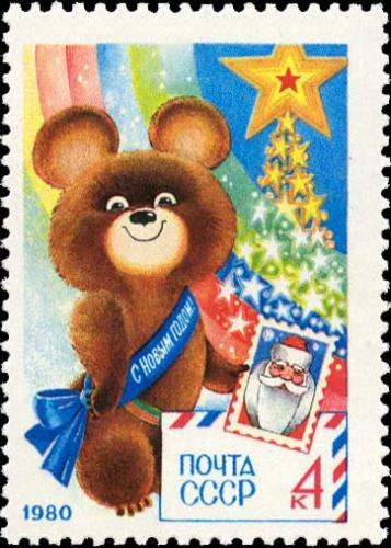 Талисман Олимпиады - Мишка, стилизованная ёлка, стилизованная марка с изображением Деда Мороза и конверт